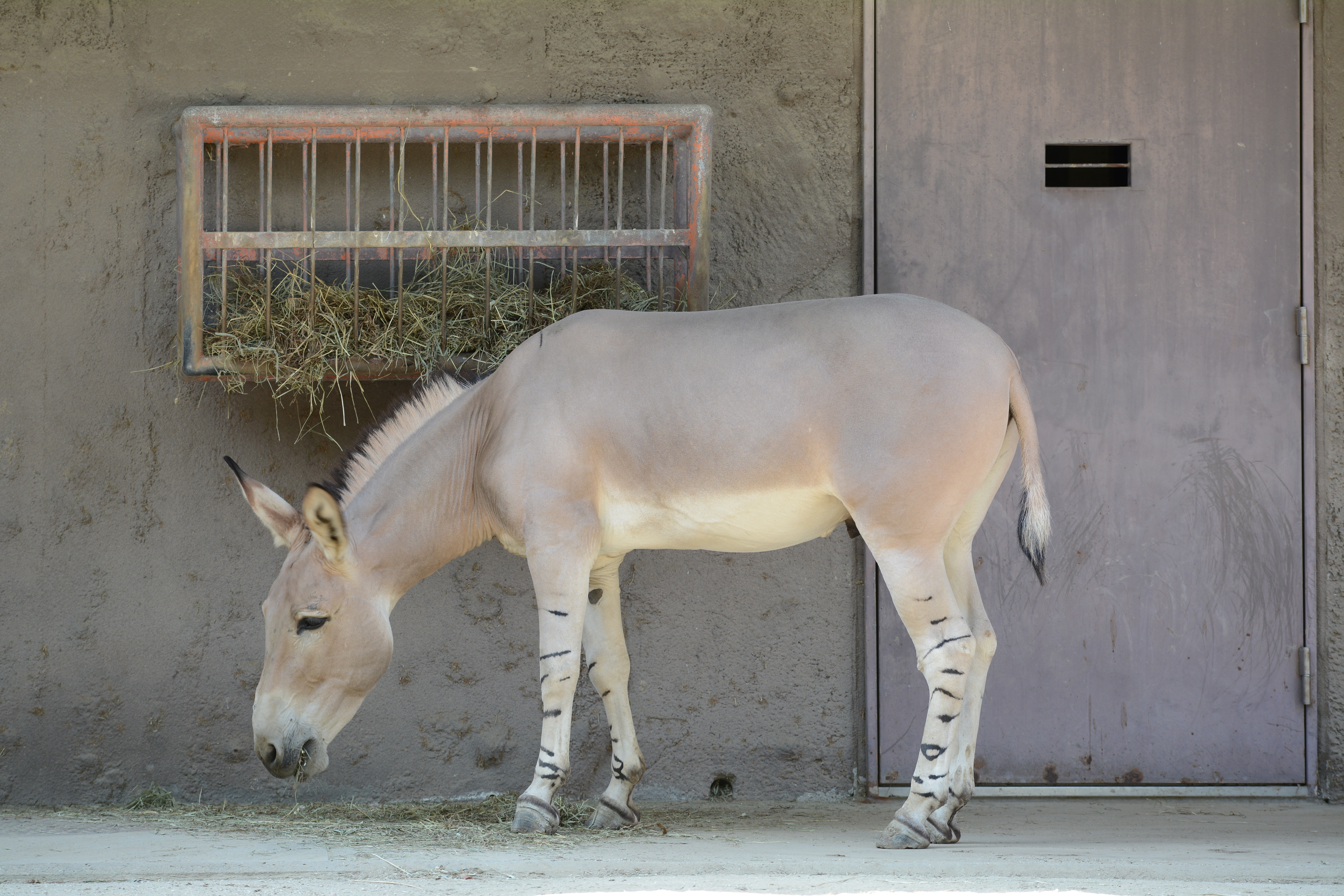 ソマリノロバ